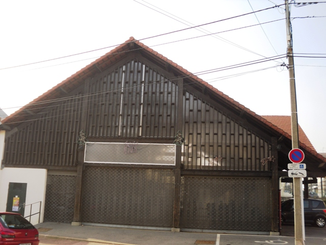 Le marché couvert d'Epinay-sur-Orge (91)